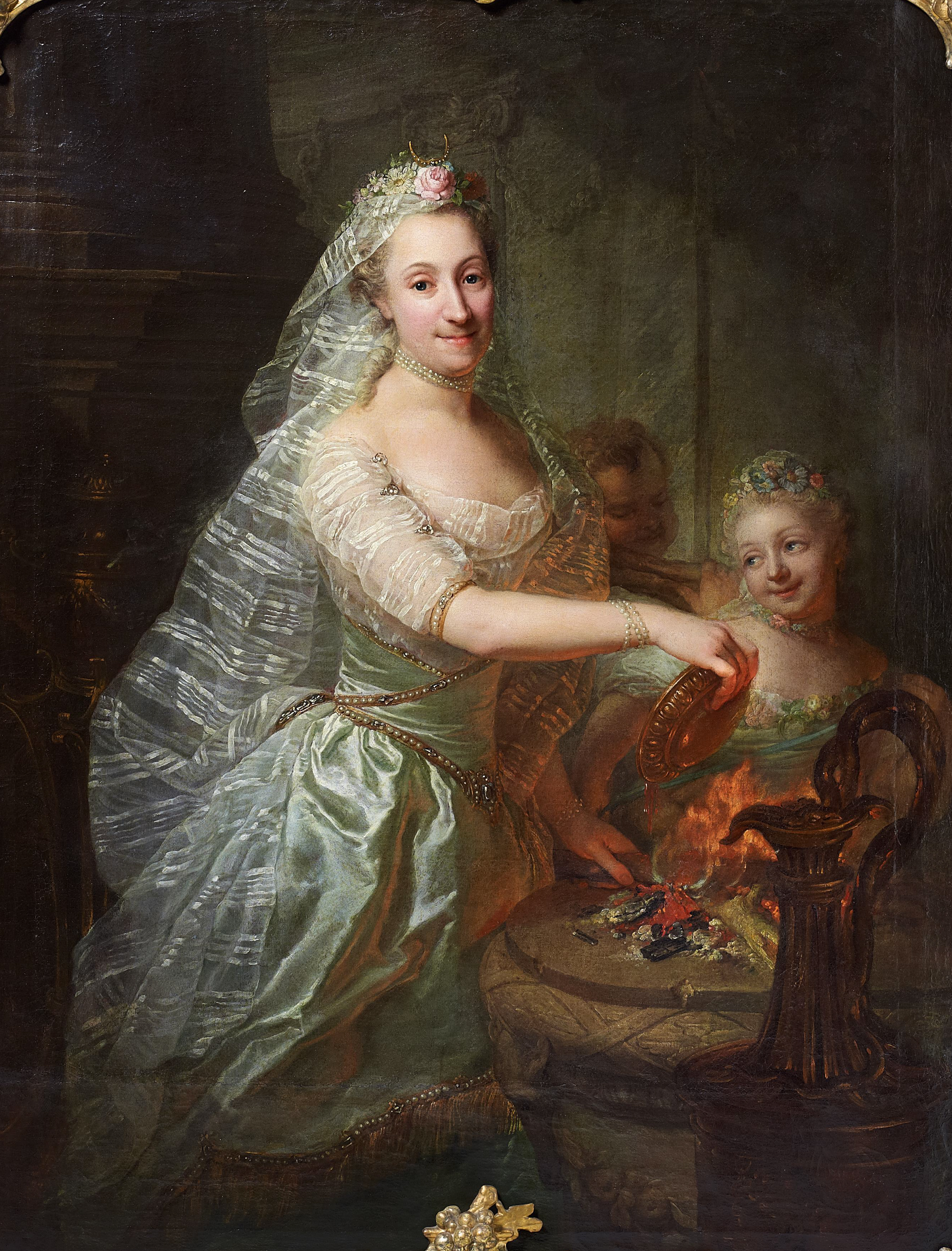 Porträt der Magdalene Charlotte von Olthoff (Schwester des schwedisch-pommerschen Regierungsrats Adolf Friedrich von Olthof) im weißen Kleid als Opferpriesterin. Neben ihr die etwa 12-jährige Tochter Eleonore. Öl auf Leinwand. 152 x 115 cm. Provenienz: Sammlung Schwarz-Liebermann, Rheinbreibach, in direkter Erbfolge aus der Familie der Dargestellten.